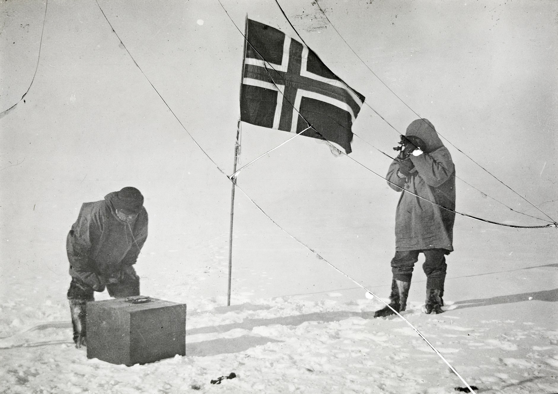 Хельмер Хансен и Руаль Амундсен определяют свои координаты на Южном полюсе